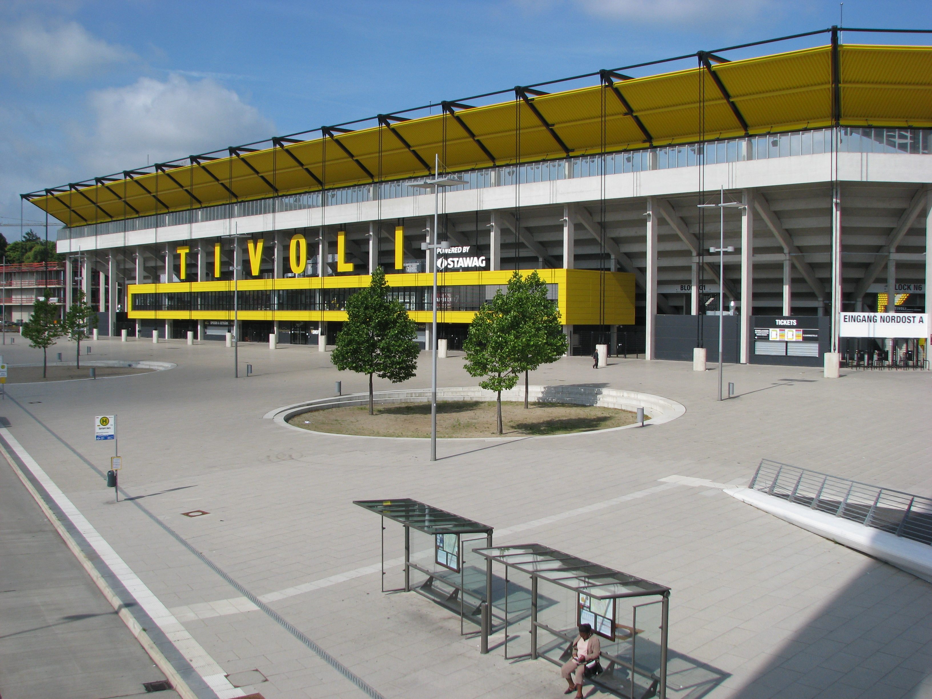 Tivoli Aachen mit Bushaltestelle Sportpark Soers.